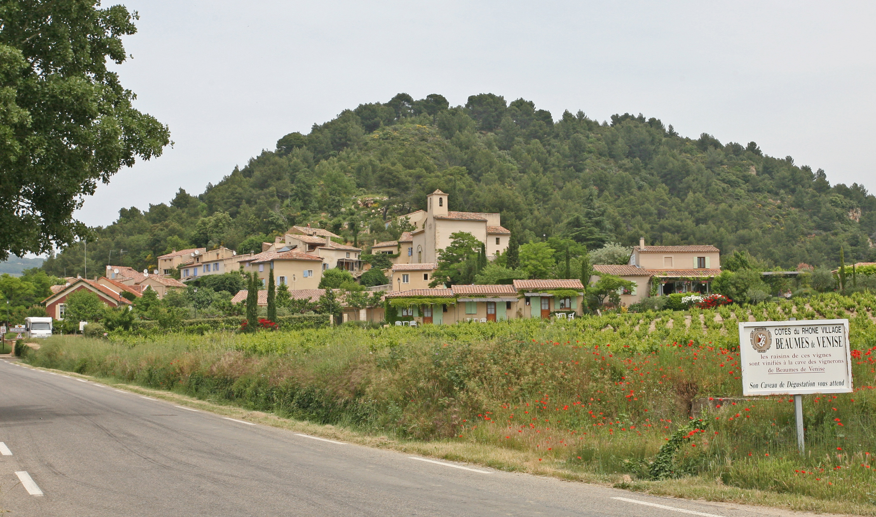 Lafare (commune de Vaucluse)